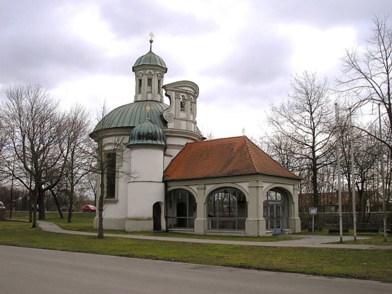 Wallfahrtskapelle Maria Alber (Friedberg, Landkreis Aichach-Friedberg, Bayerisch-Schwaben). Gesamtansicht von Nordwesten. Eigene Aufnahme, März 2007 / Pilgrimage chapel Maria Alber near Friedberg (Bavaria, Germany). Total view from the north-west. Own photo, March 2007